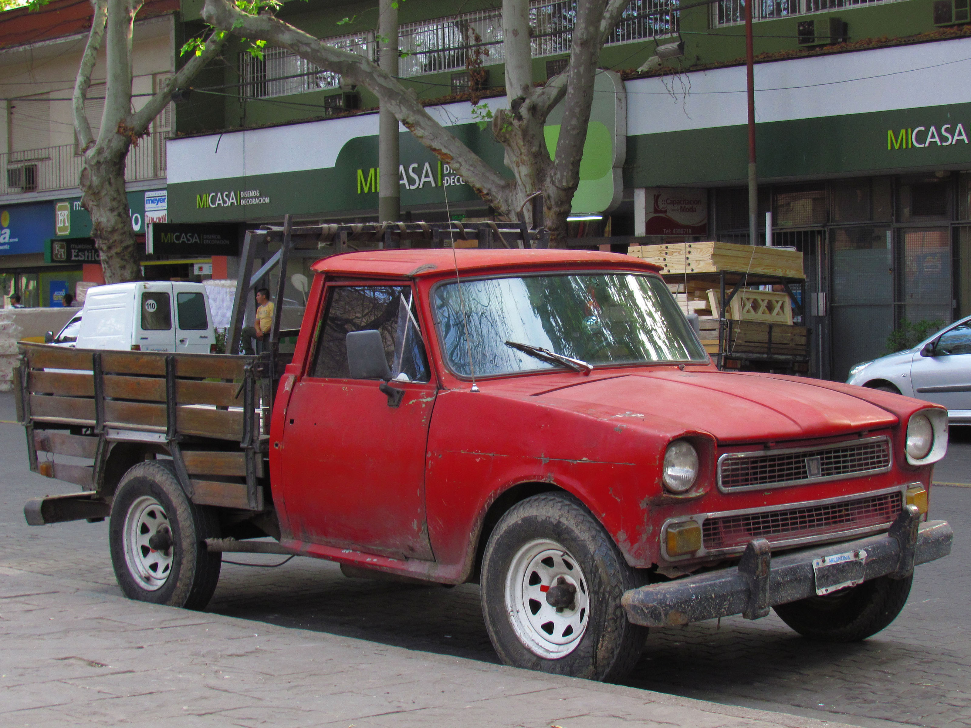 iAME Rastrojero Diesel